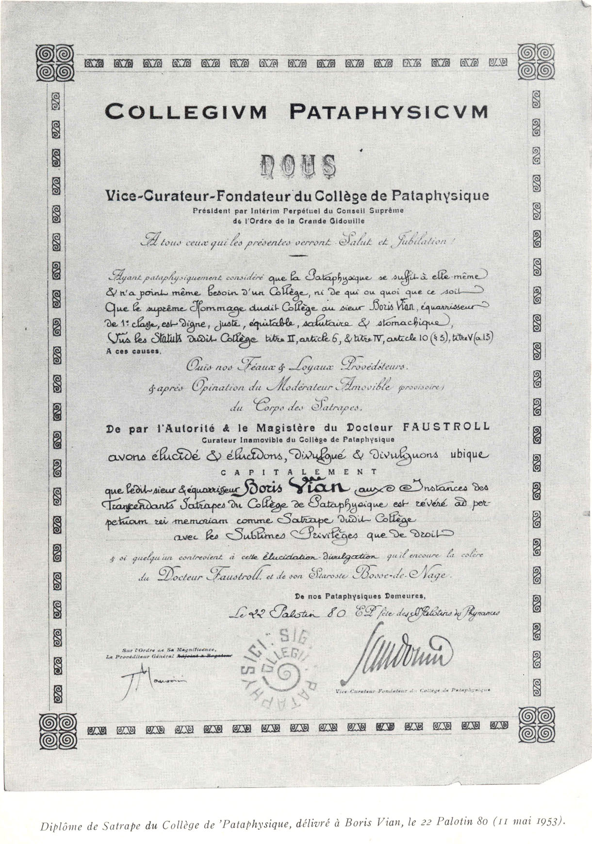 Une reproduction du diplome de membre du Collège de Pataphysique de Boris Vian, Document tiré de la revue trimestrielle "Bizarre", J. J. Pauvert, numéro spécial B. Vian de fevrier 1966